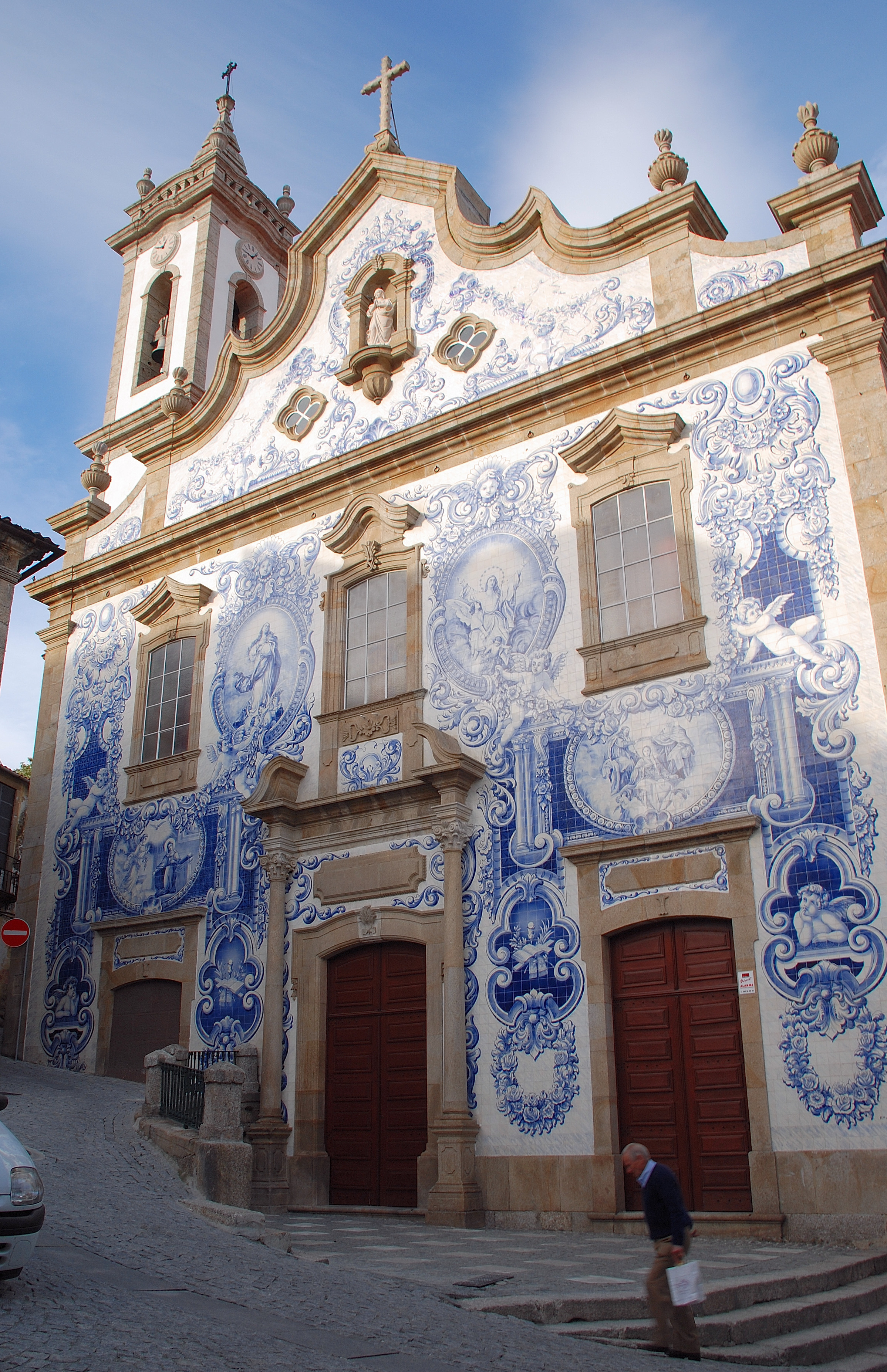 Façade of the Covilhã Church, Portugal